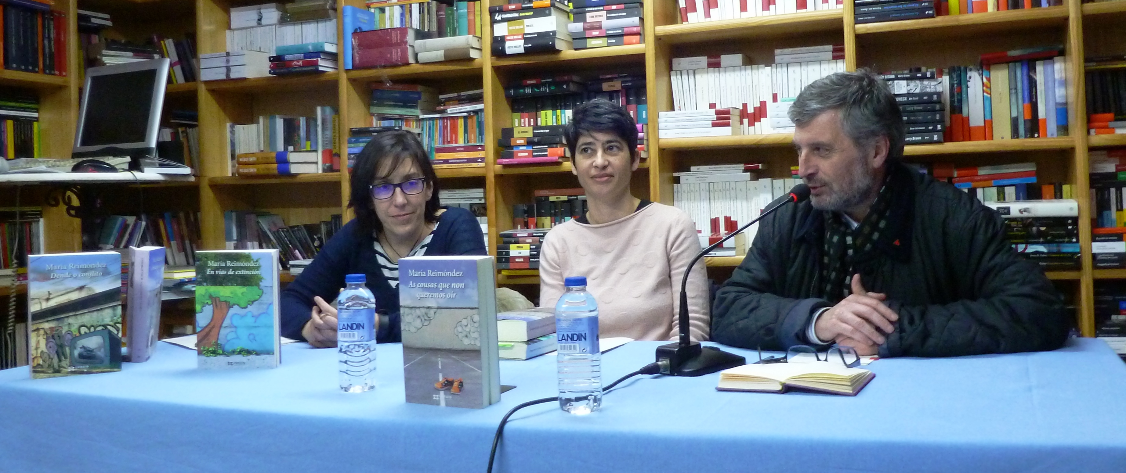 Eva Mejuto, María Reimóndez e Manuel Bragado na presentación de "As cousas que non queremos oír", na Libraría Paz de Pontevedra, 21/03/2018